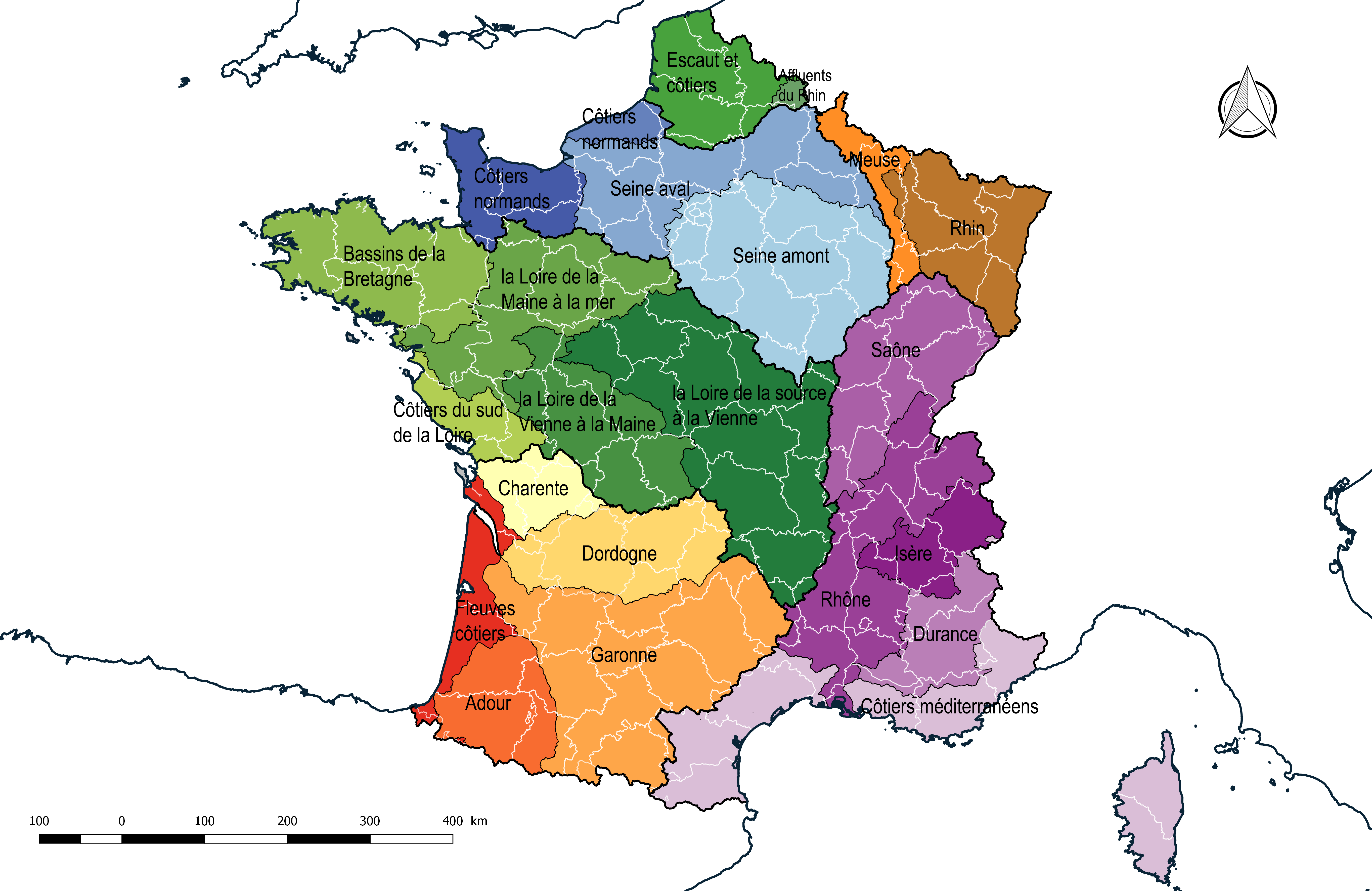 Carte des régions hydrographiques de la France.